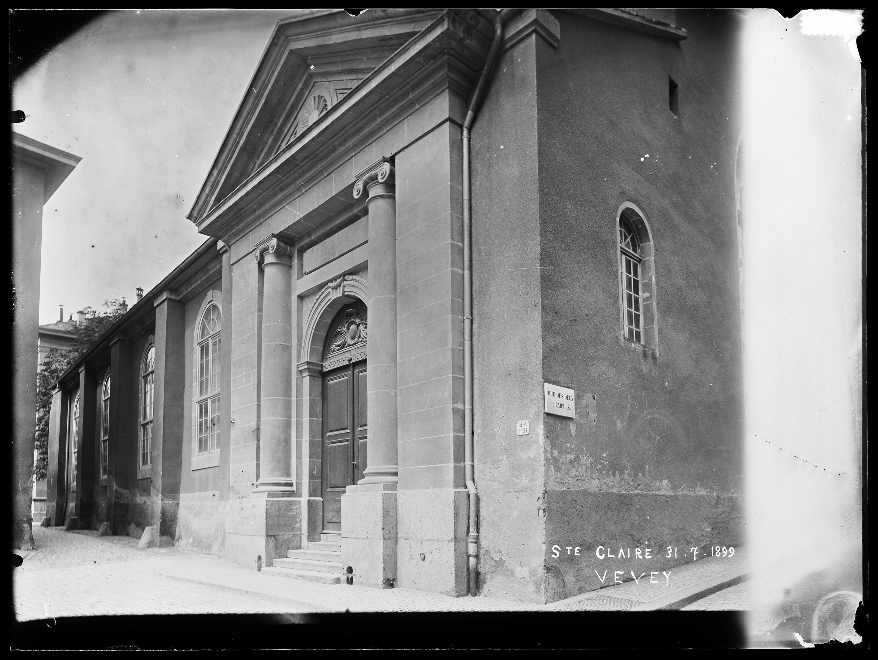 Cliché pris à l'angle de la rue des deux temples.